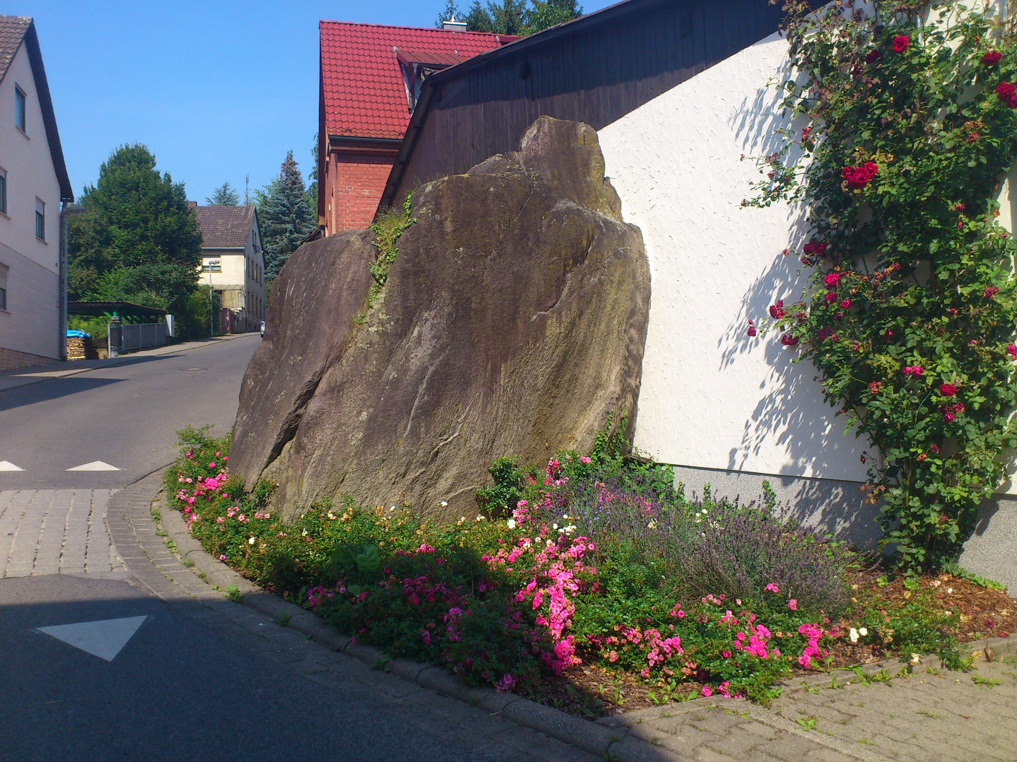 Der Felsen Großstoa in Wenighösbach